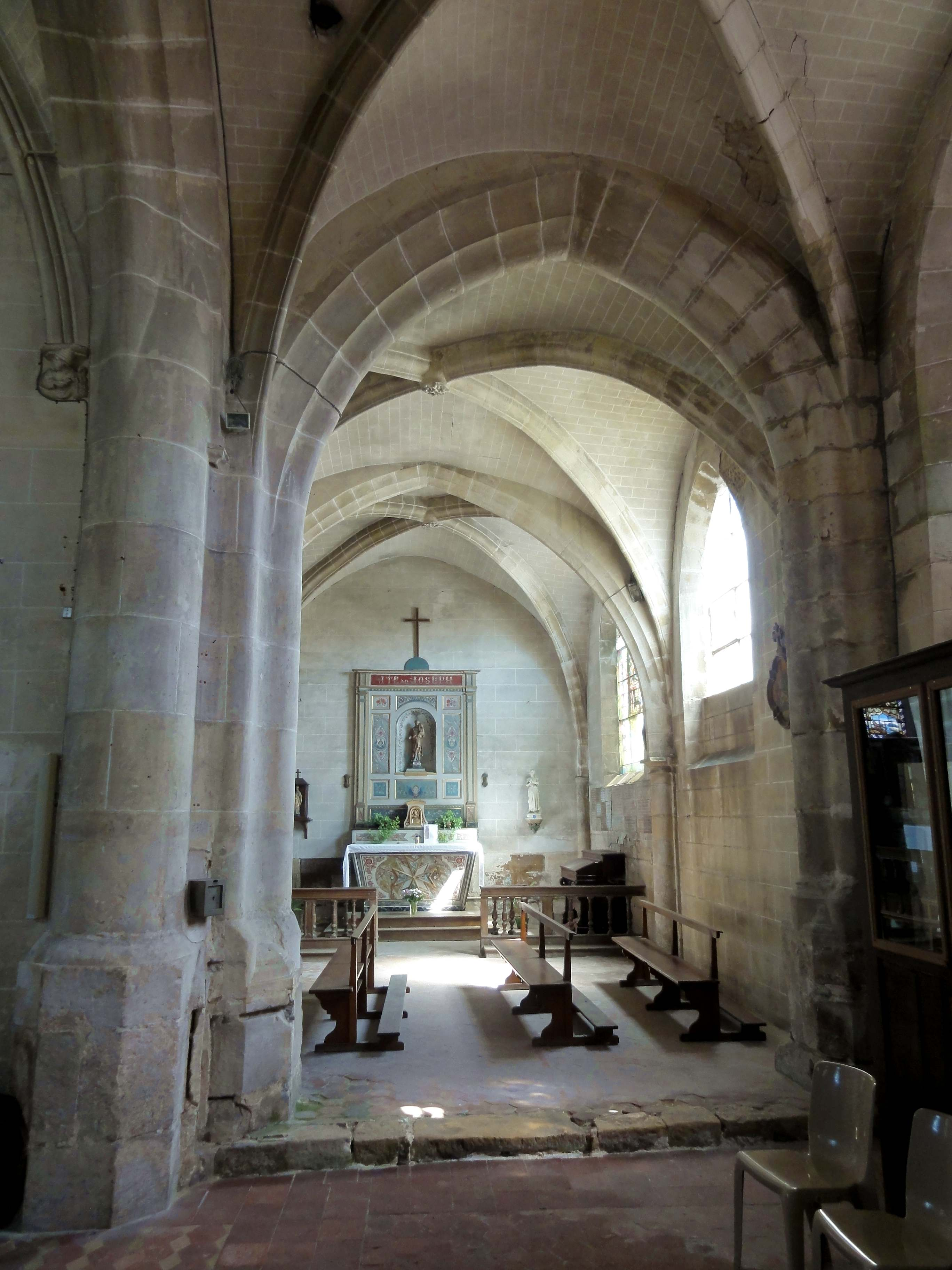 Intérieur de l'église (voir titre).